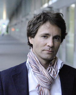 Portrait Bernhard Barta